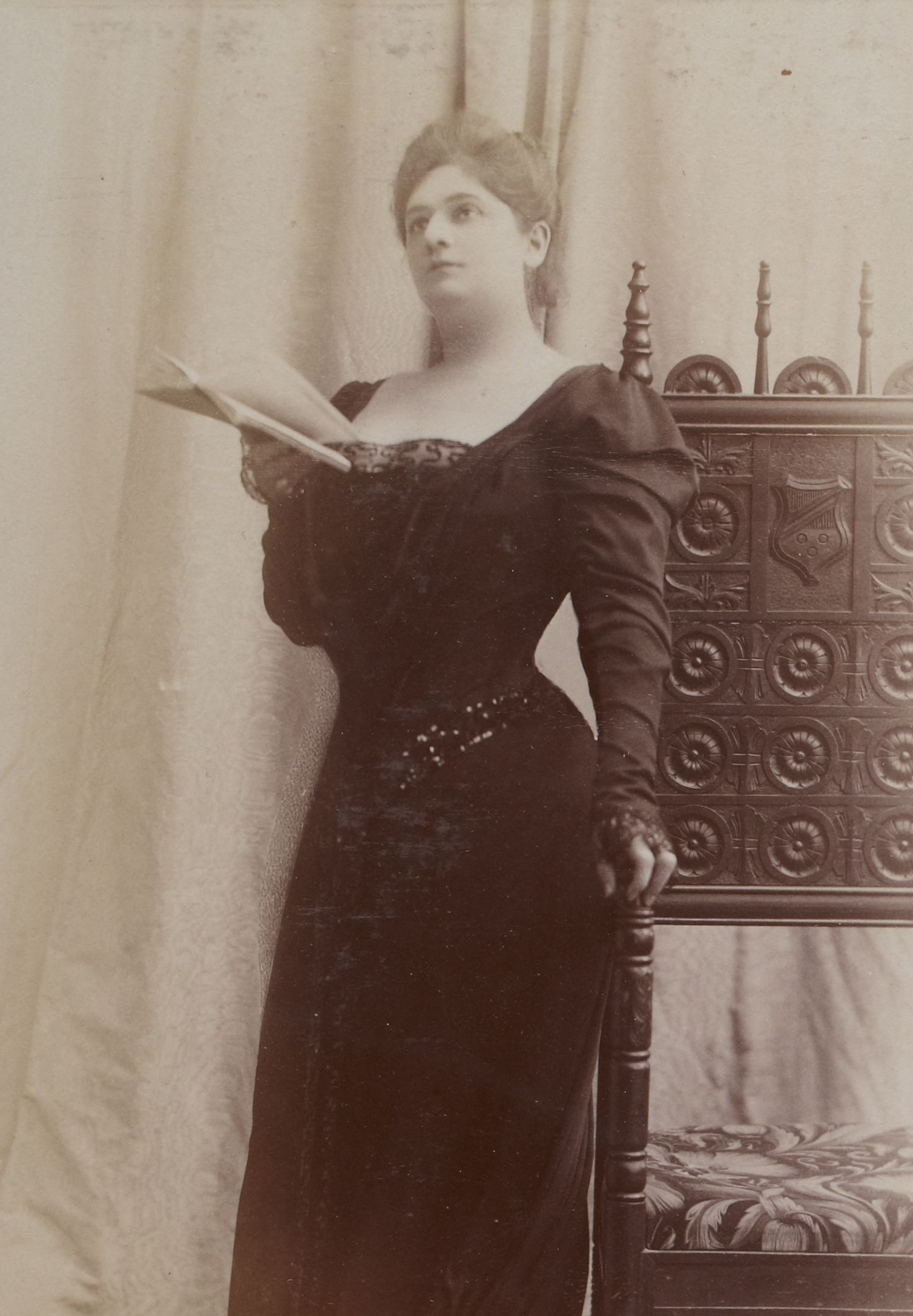 Album Reutlinger de portraits divers, vol. 2. Blanche Marchesi, Cécile Eyreams.